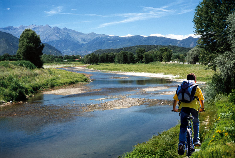 Torrente Sangone - Provincia di Torino - Piemonte - Italia